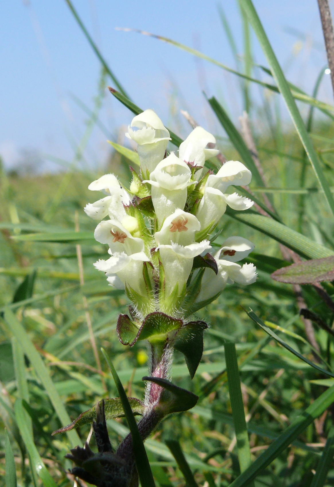 Prunella laciniata, Schwäbisch-Fränkische Waldberge, Germany